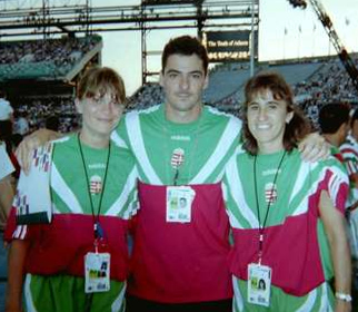 Tóth Beatrix kézilabdázó, Gyulay Zsolt kajakos és Kocsis Erzsébet kézilabdázó (balról jobbra) az 1996. évi nyári olimpiai játékok záróünnepsége előtt.